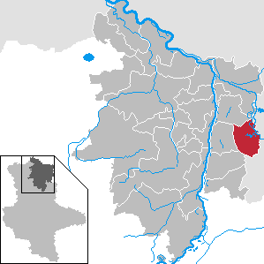 Schollene im Landkreis Stendal, Sachsen-Anhalt